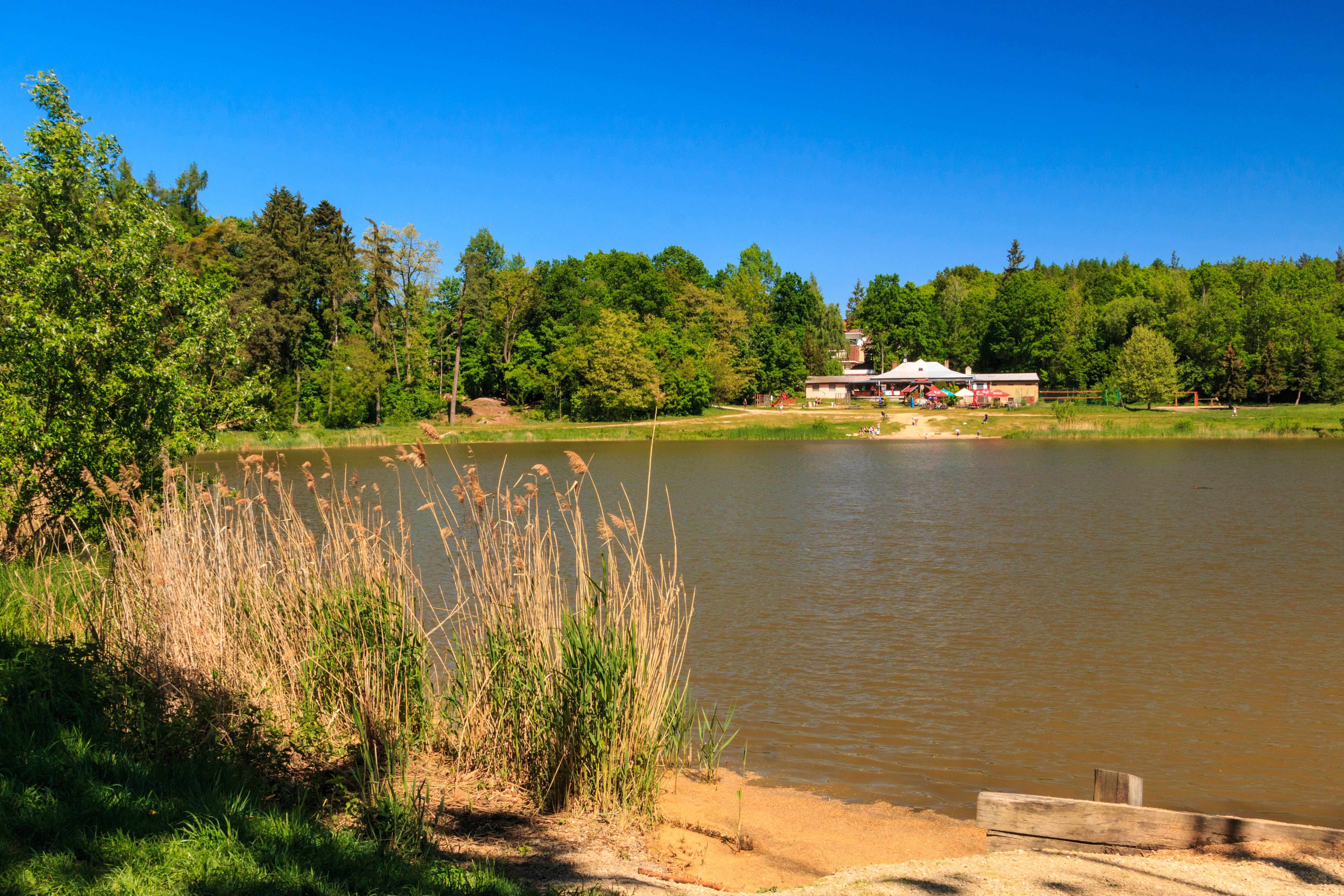 Rybník Biřička Project: Vodstvo.